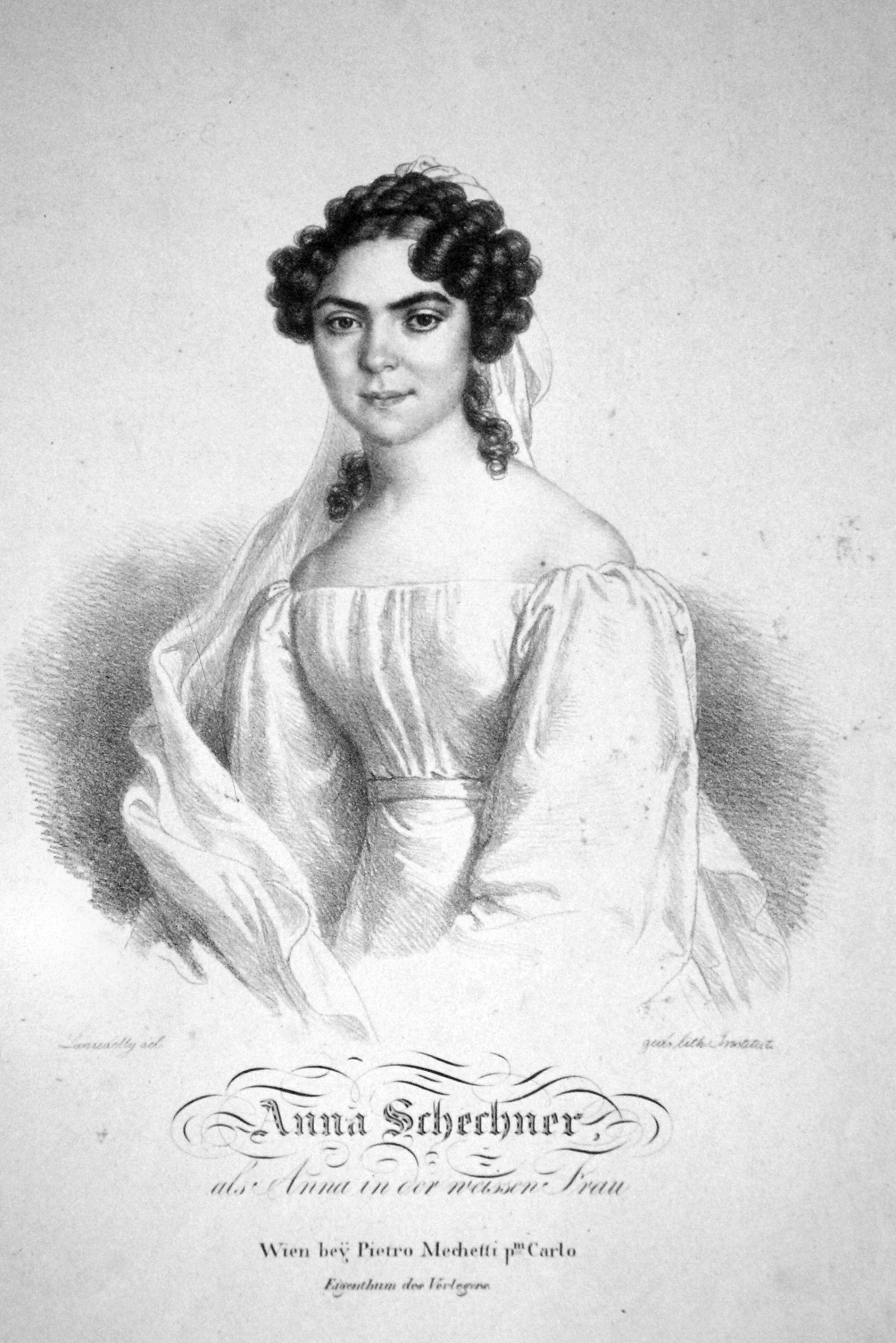 Anna Schechner (1806-1860), deeutsche Opernsängerin, um 1826 in Wien engagiert. Lithographie von Josef Lanzedelli d. Ä., um 1830